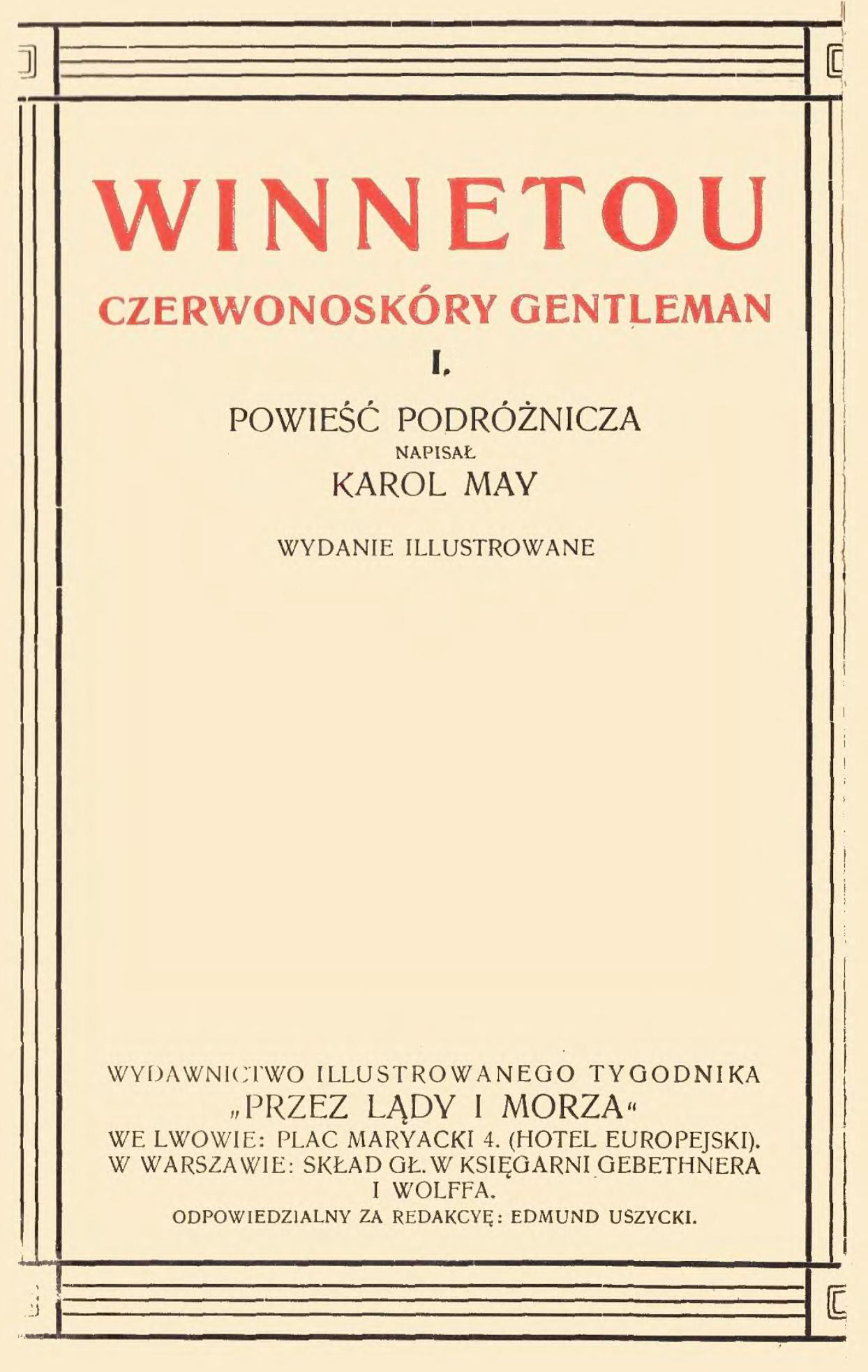 okładka I tomu